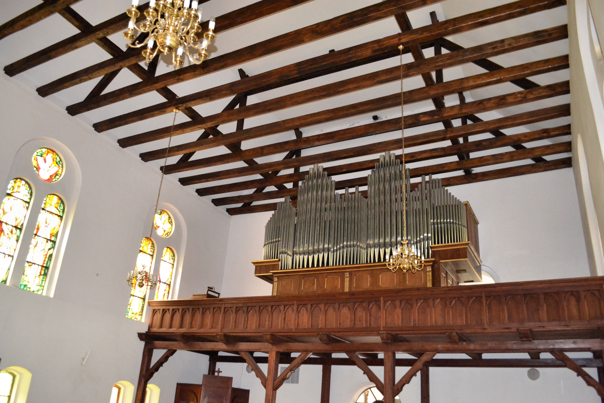 Neogotycki kościół Miłosierdzia Bożego w Trzęsaczu